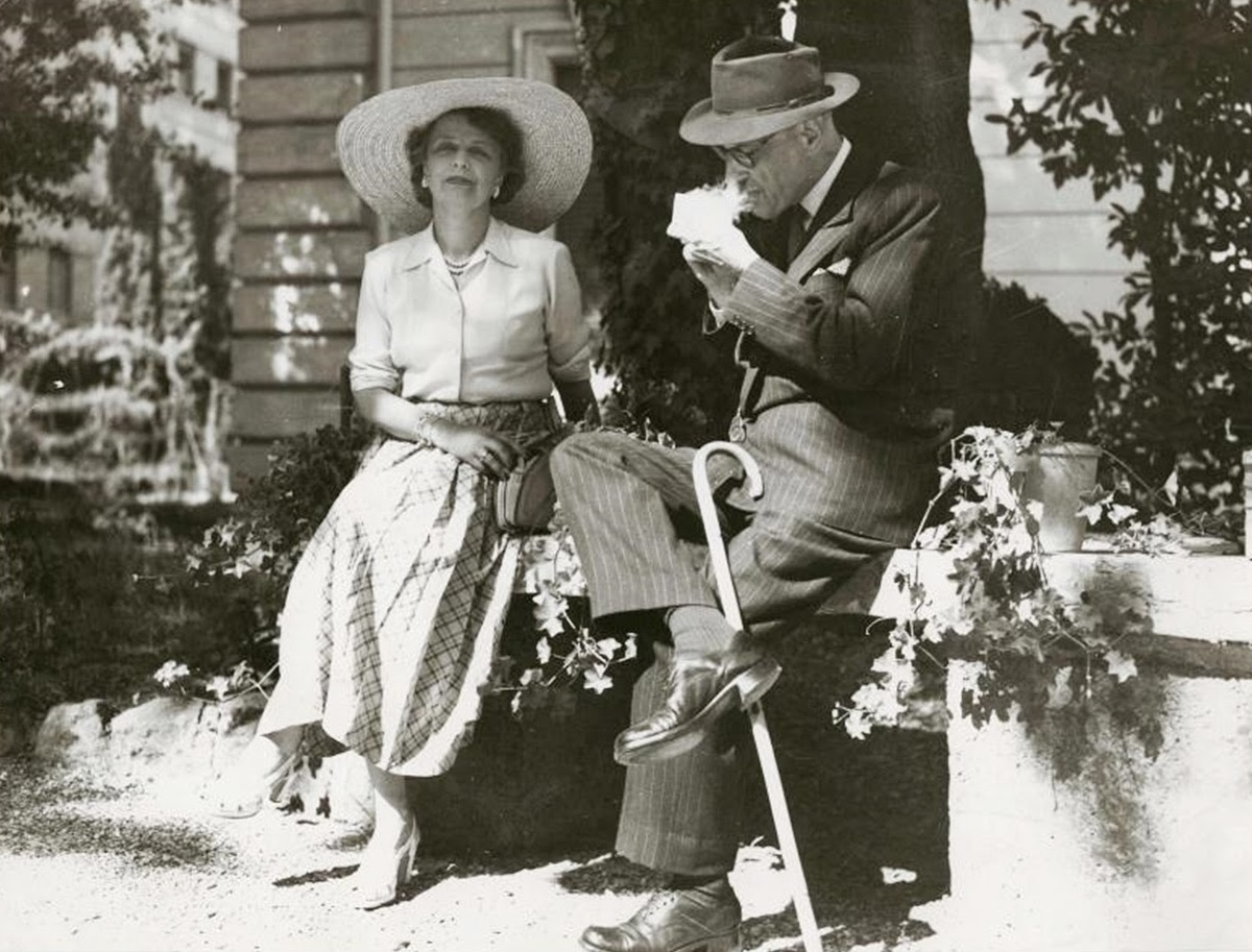 Károlyi Mihály és Felesége Andrássy Katinka a római magyar nagykövetség kertjében.